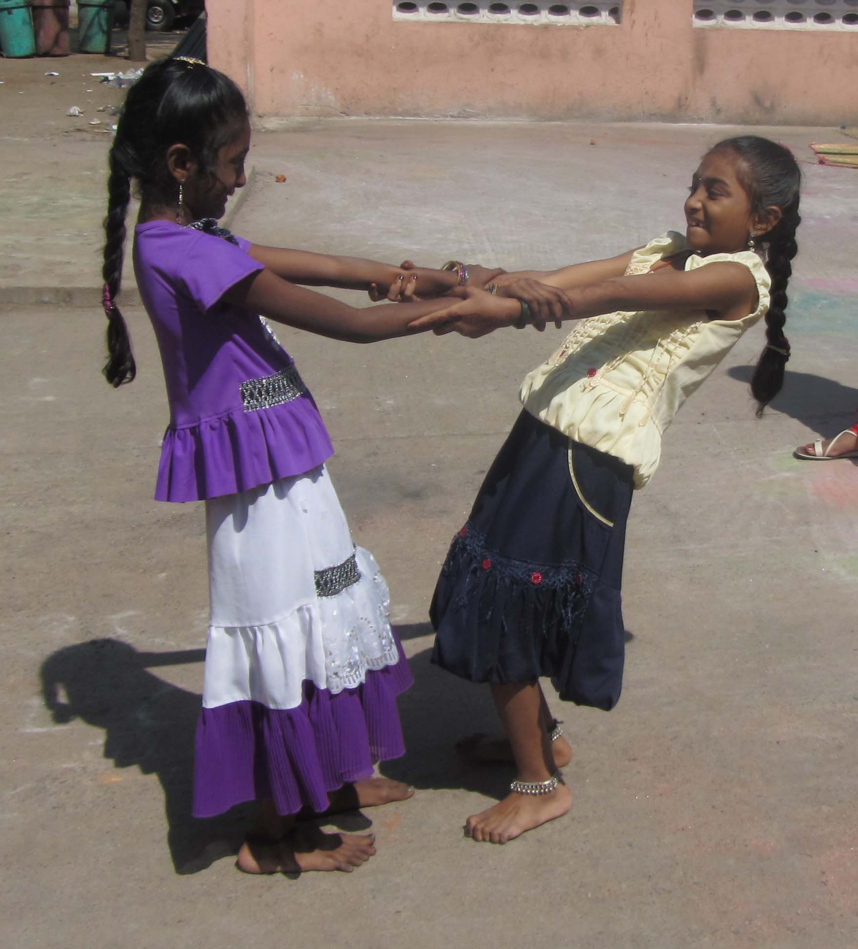 உந்தீ பற விளையாட்டு. ஏழாம் நூற்றாண்டு நூல் திருவாசகம் இதனைக் குறிப்பிடுகிறது. own shot